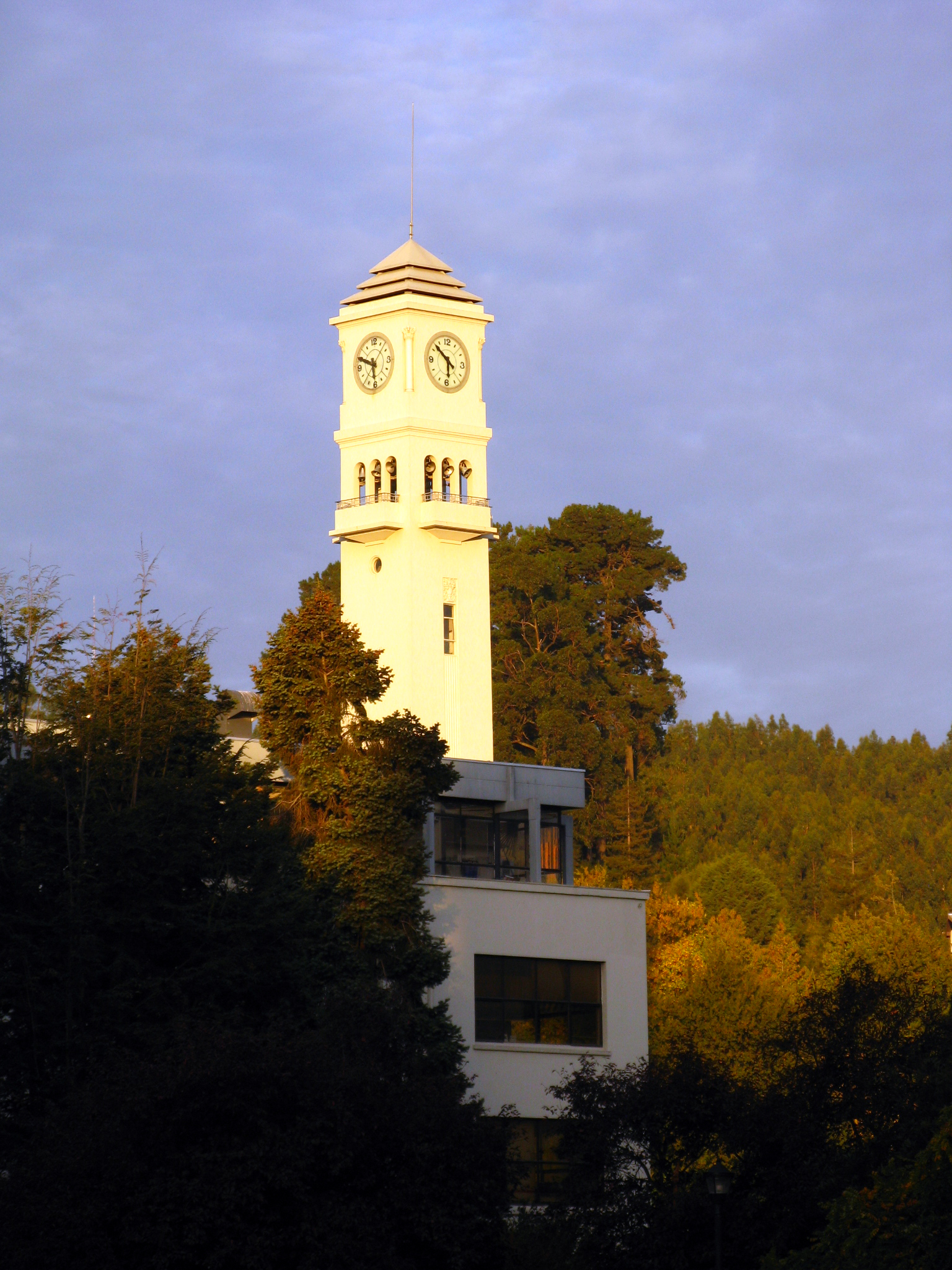 Campanil de la Universidad de Concepción Concepción, Chile Fecha: abril de 2010